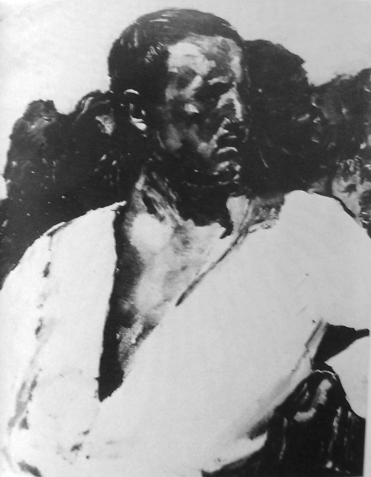 Portrait Fritz Burger-Mühlfeld (Maler: Albert Weisgerber, 1911)